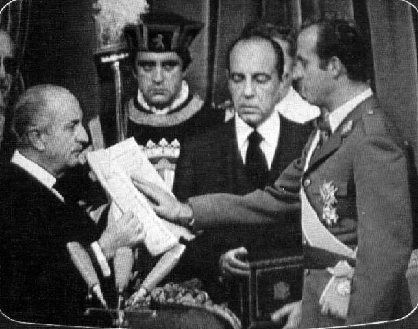 Don José María Sánchez-Ventura y Pascual, documentó el Juramento del Rey en un Acta Notarial Histórica.